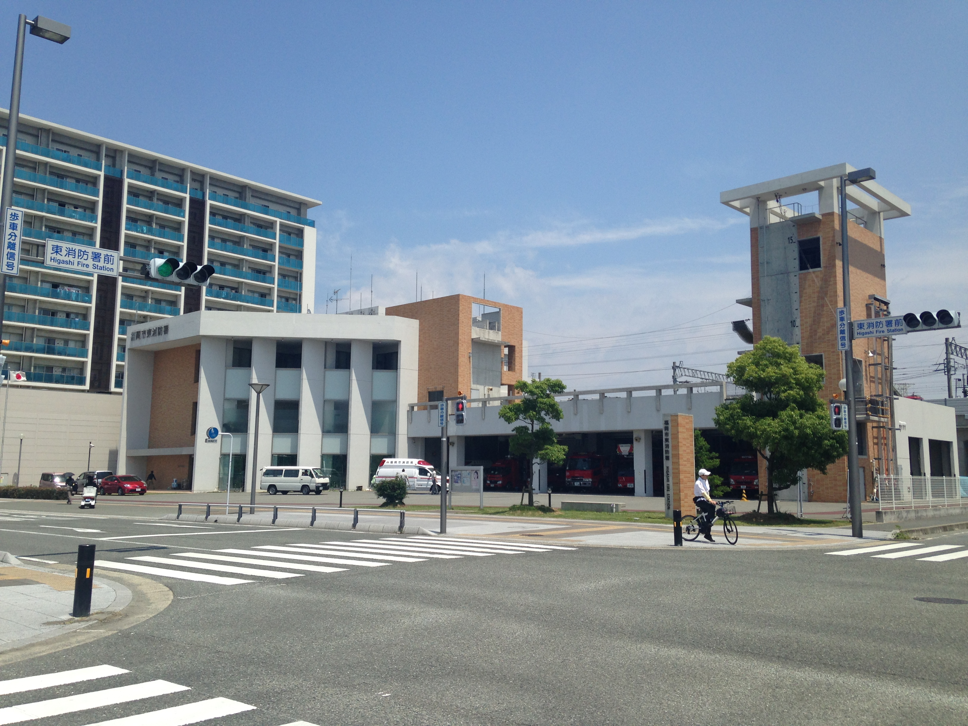 福岡市東消防署